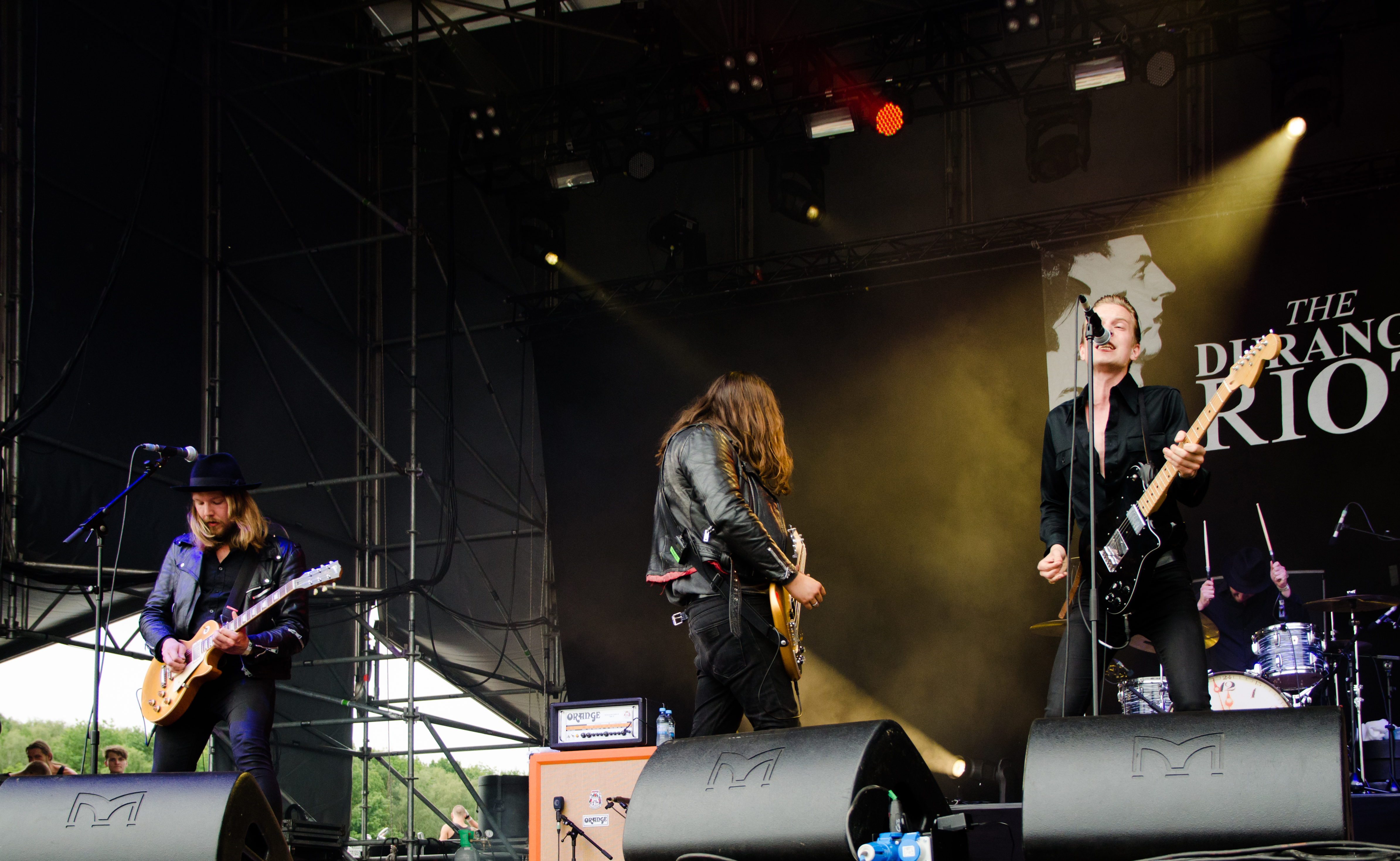 Die Band The Durango Riot auf dem Kosmonaut Festival 2014 in Chemnitz Oberrabenstein.